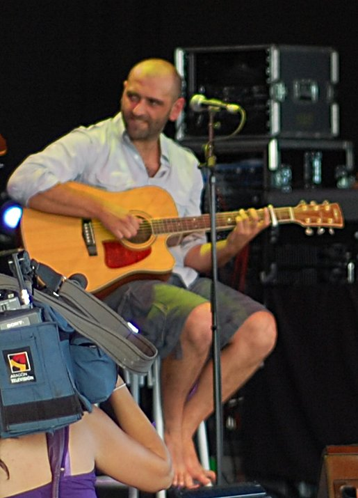 Famosos en el Balcón de las Músicas.